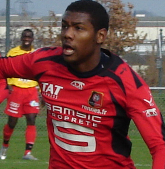 Kévin Théophile-Catherine